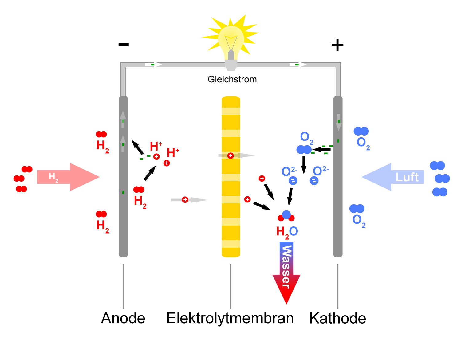 Schematische Darstellung des Funktionsprinzips einer Brennstoffzelle